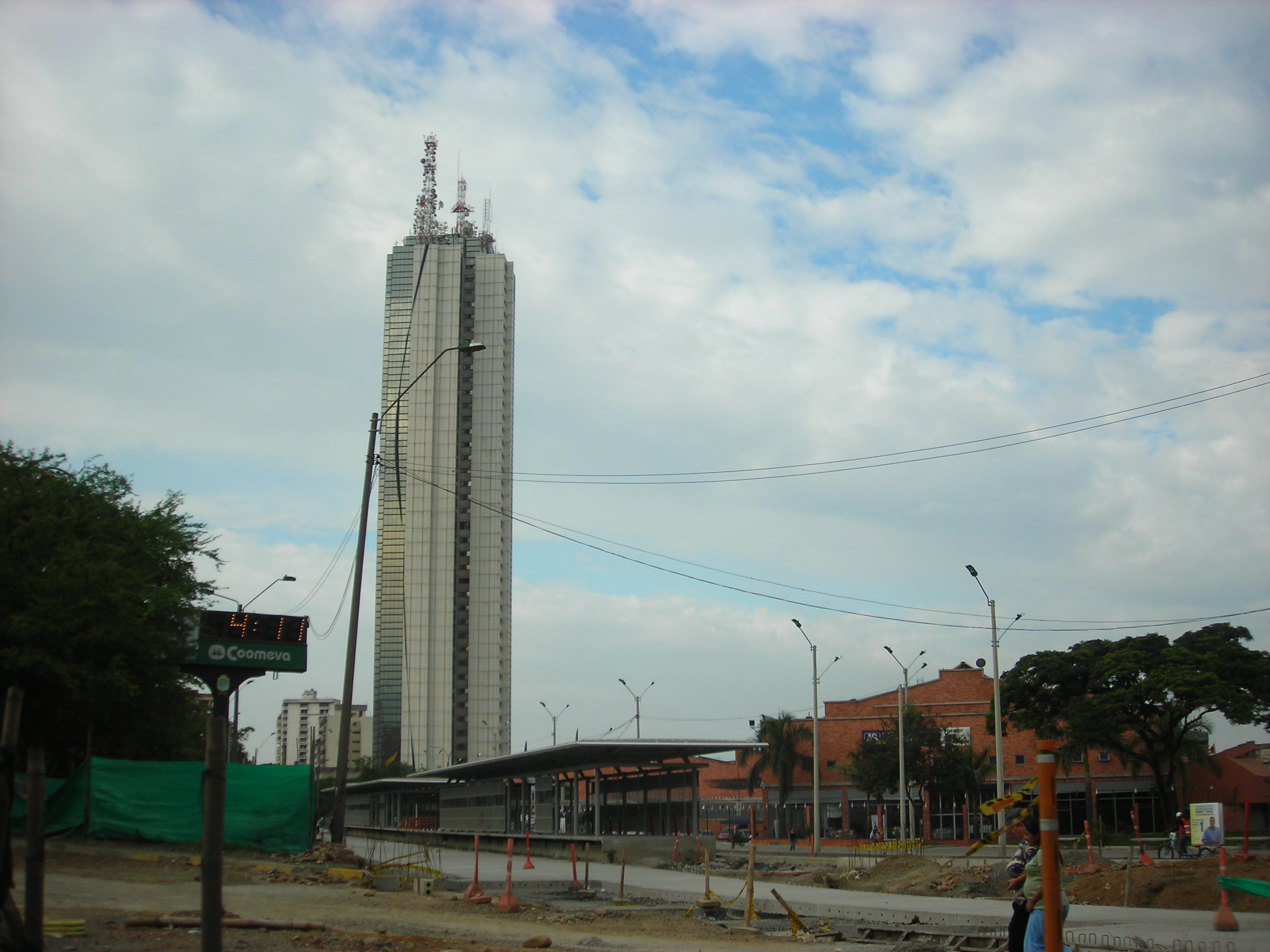 construcción del MIO, un sistema de transporte masivo.